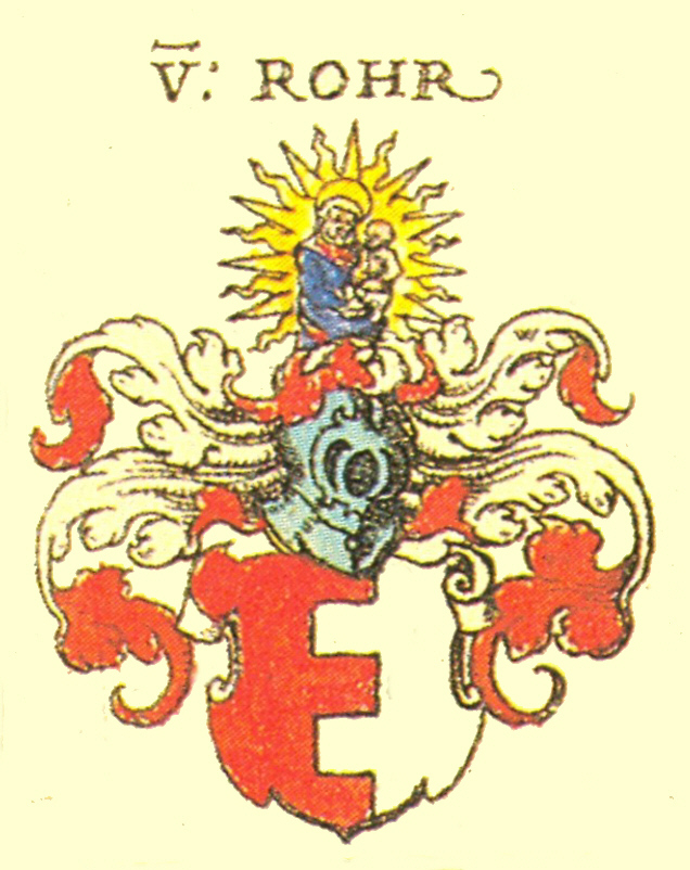 Wappen des Bayerischen, Märkischen und Braunschweigischen Adelsgeschlechts Rohr.